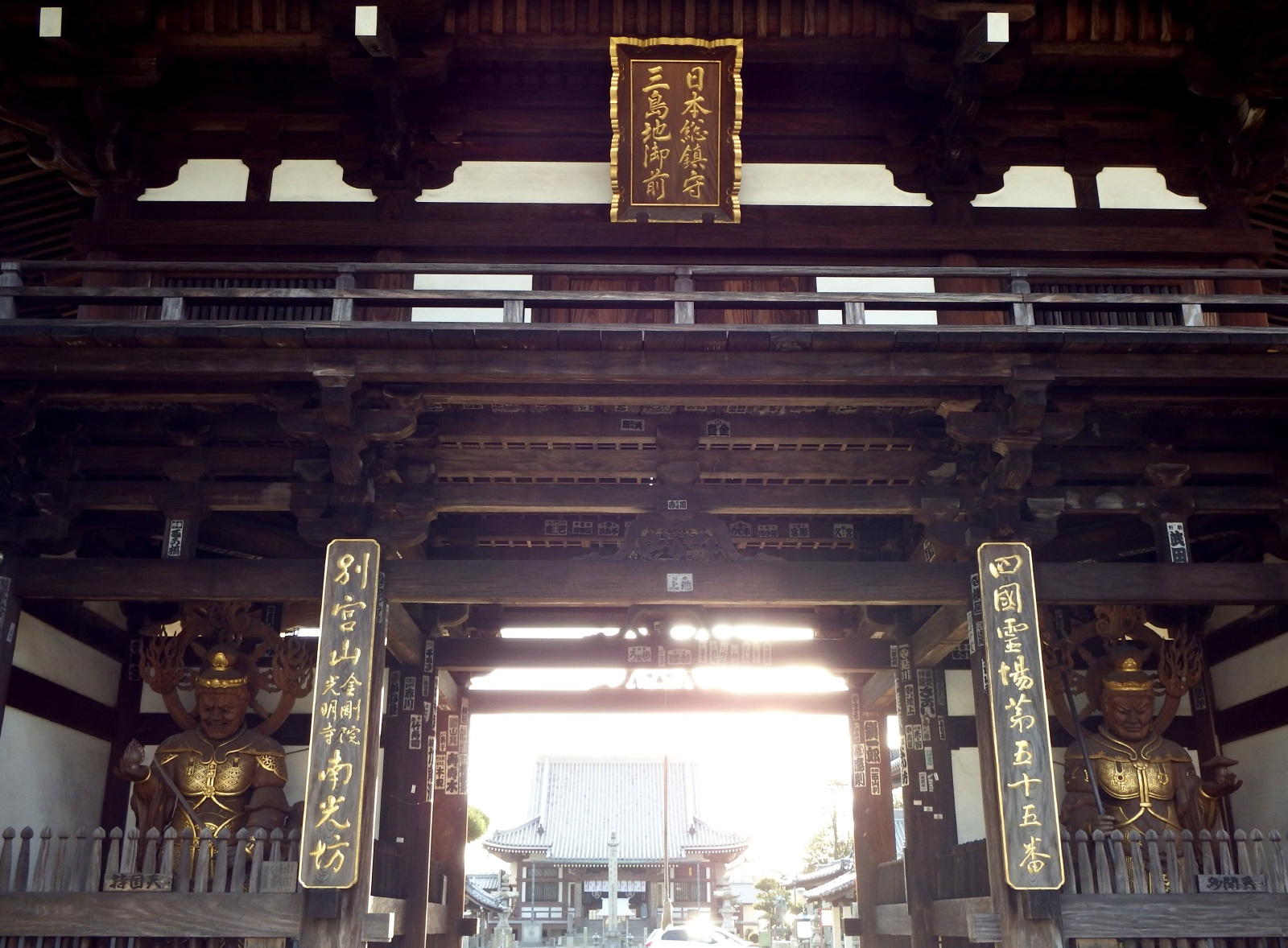 南光坊 山門